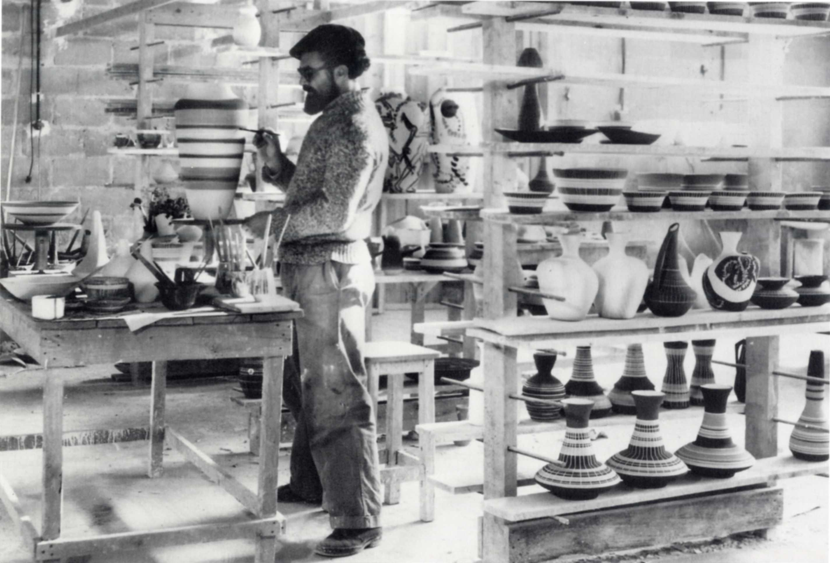 נחמיה עזז במחלקה האמנותית של מפעל "חרסה", באר שבע, 1960-1955